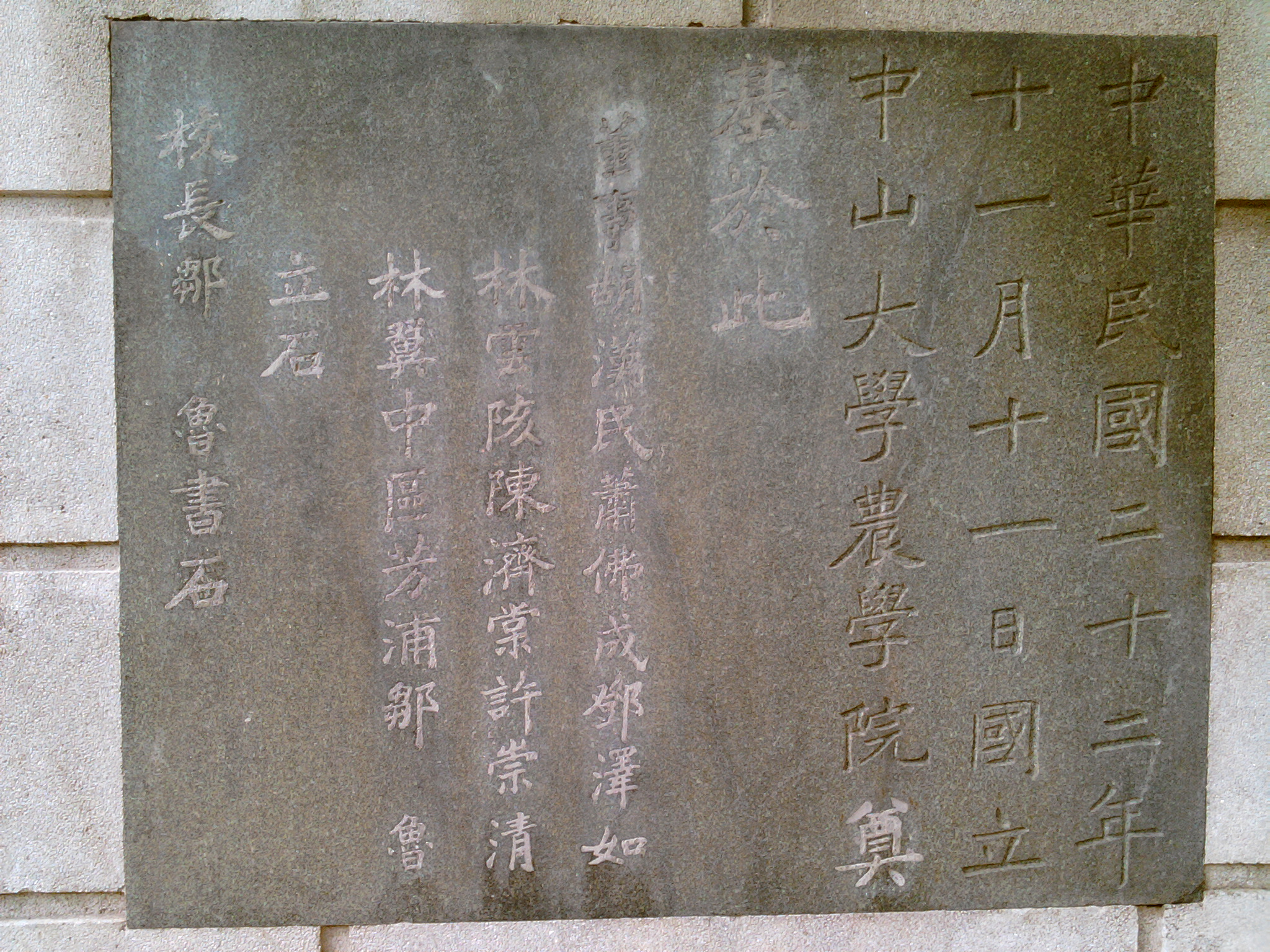 中華民國二十二年十一月十一日國立中山大學農學院奠基於此。 董事胡漢民蕭佛成鄧澤如 林雲陔陳濟棠許崇清 林翼中區芳浦鄒魯 立石 校長鄒魯書石 校董名單在文化大革命期間曾被人用水泥塗抹，現依然可見破壞痕跡。